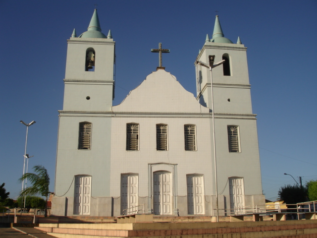 Igreja Nossa Senhora do Ó, localizada no centro da cidade de Traipu, Alagoas.